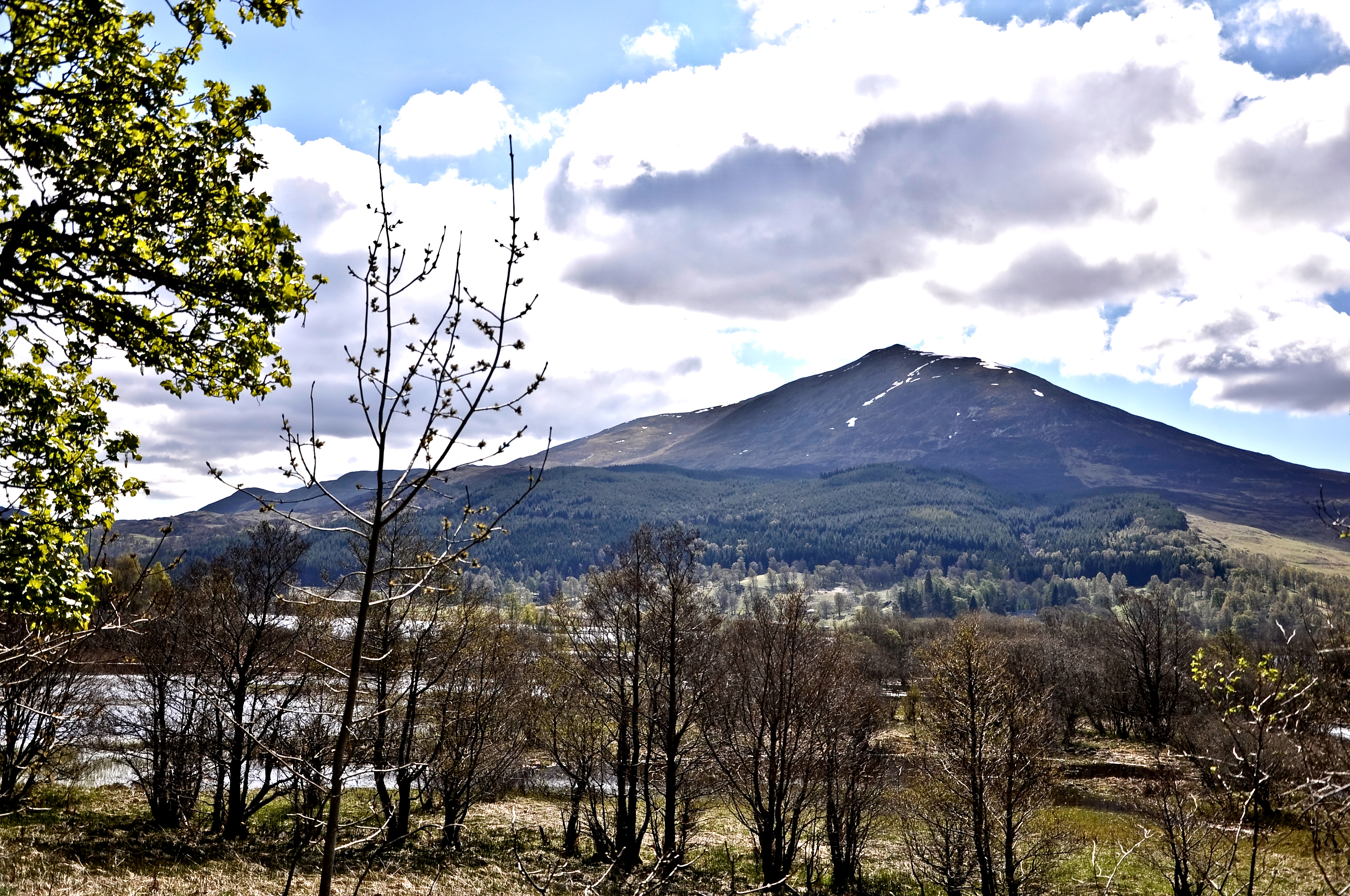 De Schiehallion, een berg in Schotland